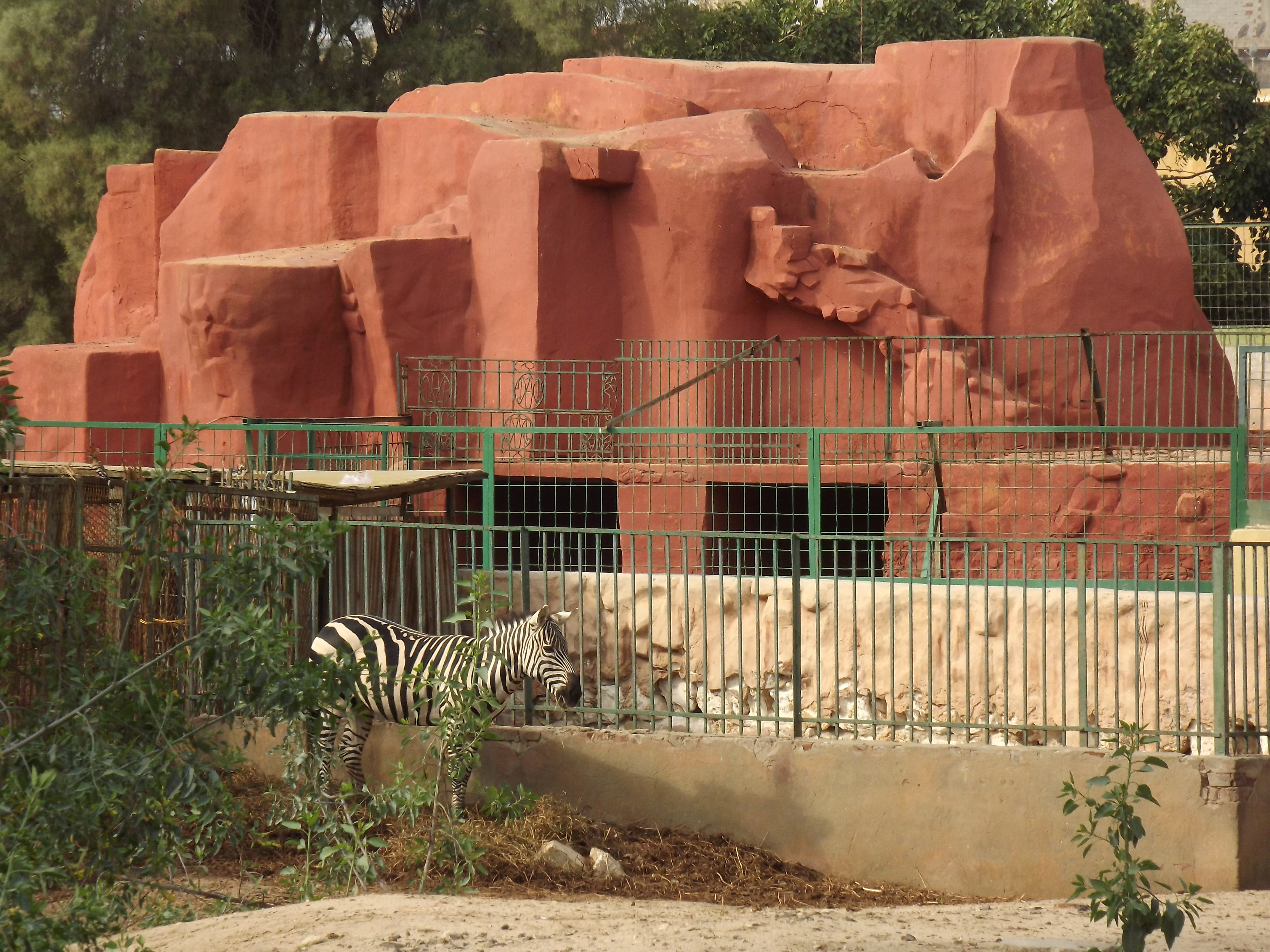 حديقة حيوان النزهة - الاسكندرية